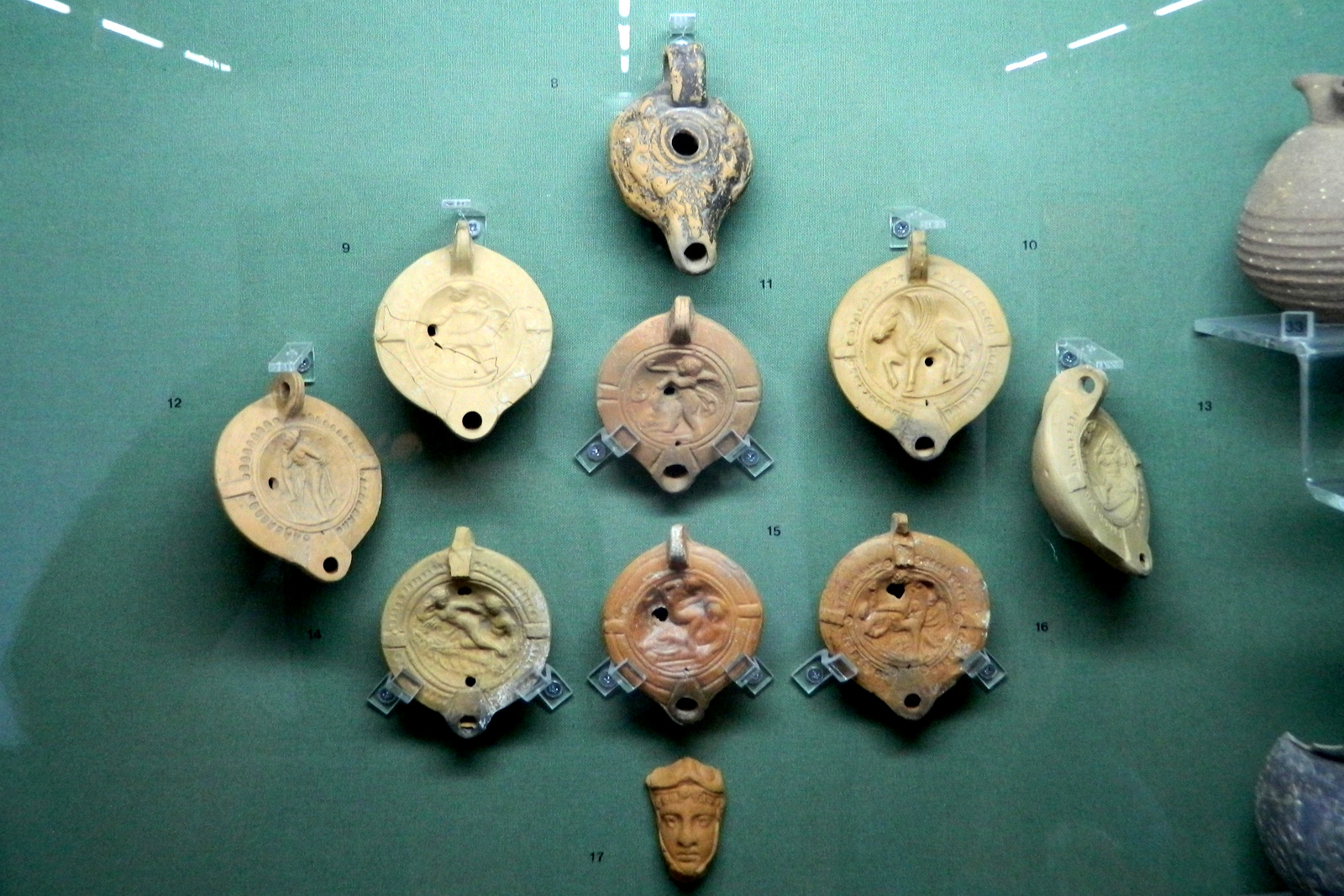 Ceramiczne kaganki oliwne, jedne zdobione scenami z mitologii, inne erotycznymi. III i IV wiek n.e. , Okręgowe Muzeum Archeologiczne w Lamii, Grecja